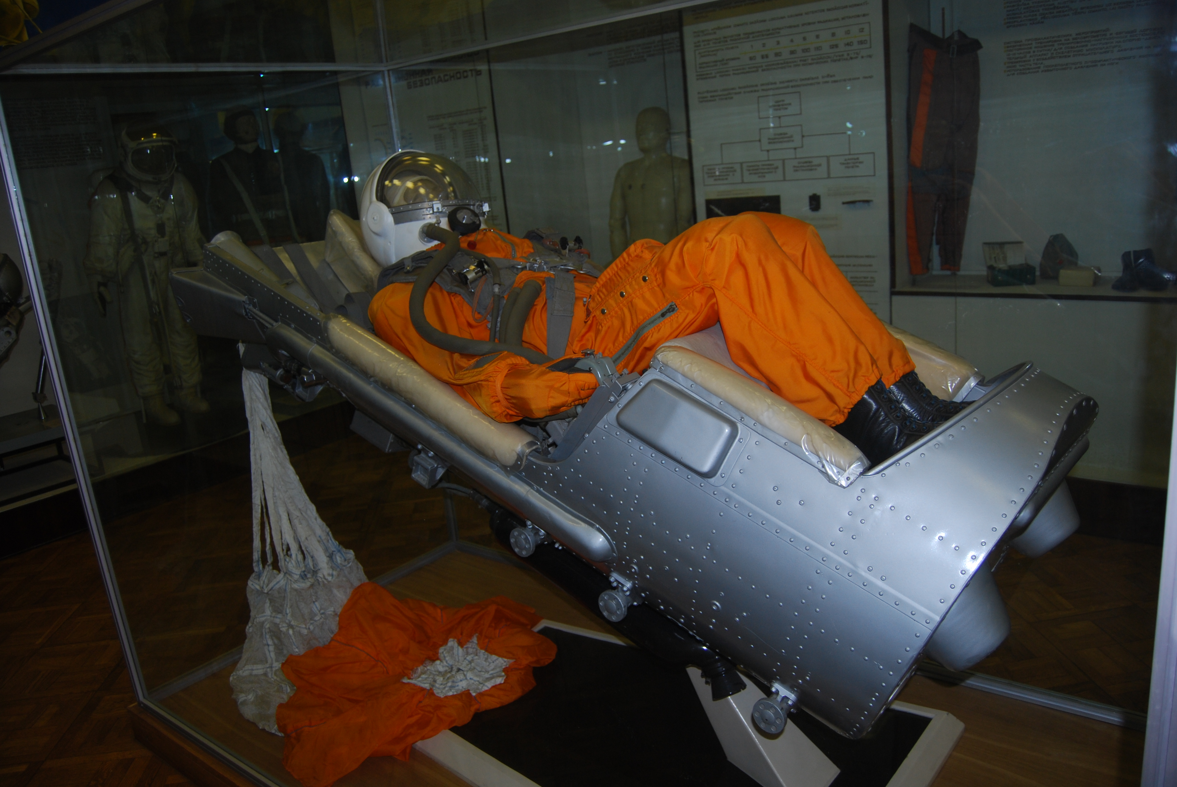 "Vostok" katapultējamais krēsls. (P. Stradiņa Medicīnas vēstures muzejs.)